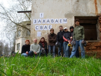 Ахова спадчыны